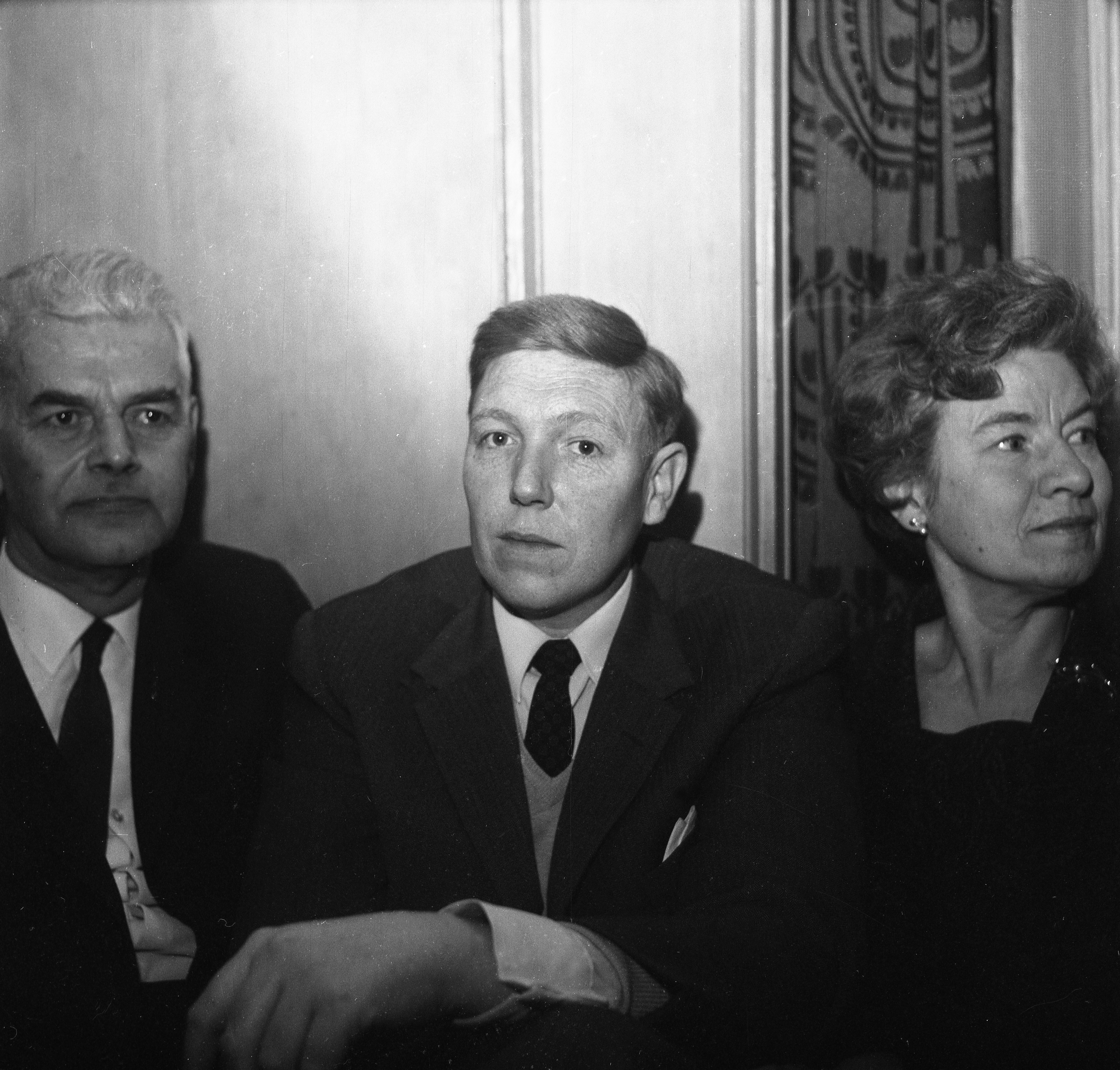 Format: 120 mm sort/hvitt negativ Dato / Date: 1969 Fotograf / Photographer: Eirik Sundvor (1902 - 1992) Sted / Place: Bergen, Hordaland Wikipedia: Magne Lerheim (1929 - 1994) Hvem er hvem? (1973): Magne Lerheim (1929 - 1994) Eier / Owner Institution: Trondheim byarkiv, The Municipal Archives of Trondheim Arkivreferanse / Archive reference: Tor.H43.B78.F16144 Merknad Magne Lerheim i midten, flankert av Thor Myklebust (1908 - 1989) og Olaug Svartveit (1914 - 2004). LERHEIM Magne, ass. universitetsdirektør. Bergen, f. 14. des. 1929 i Borgund, sønn av kapt, Kristian A. L. (1883-1960) og Johanne Aarset (1885-1952). Gift 1959 Aagot Lid, f. 2. sept. 1933, dtr. av Jacob L., f. 1899, Dalekvam og Astrid Hatlestad (1910-65). St. 1950, cand. jur. 1957, diplomè College d’Europe, Belgia 1958. Sekr. Kirkedept. 1958, gen.sekr. Nasjonal-kom. for intern, ungd.arb. og sekr. Den norske Atlanterhavskom. 1960, kontorsjef Univ. i Bergen 1961, univ.sekr. Univ. i Bergen 1967, ass. dir. siden 1968. Statssekr. Kirkedept. (Lyngs regj.) aug.-sept. 1963, Finansdept. (Bortens regj.) 1966-67. Skr. kommentarutg. til Venstres program 1957 og 1961. The Problem of Sovereignty in Relation to International Integration, 1958. Medl. Statens Ungdomsråd 1961-65, stats-repr. styret Den Nationale Scene siden 1962. Medl. Oslo bystyre 1959-61, Fana herredsst. 1963-71, varaordf. 1964-67, medl. Bergen bystyre siden 1972. Form. Bergen komm. kulturutv., ordf. rådet for Festspillene siden 1972. Form. Studentvenstrelaget, Oslo 1952, Det norske Studentersamf. 1958, Norges Unge Venstre 1959-61, Fana Venstrelag 1964. Form. Hordaland Venstre siden 1971. Medl. Venstres landsstyre 1964. 1. varamann Stortinget (V.) siden 1965, møtt hvert år.